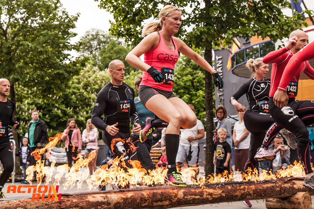 ActionRun